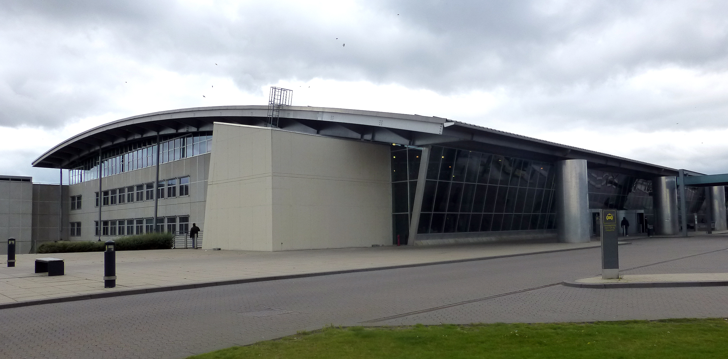 Billund Airport, passagerterminalen set fra nordøst